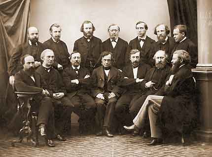 Профессора физико-математического факультета Санкт-Петербургского университета (1868). Сидят слева направо: А. В. Советов, П. Л. Чебышёв, К. Ф. Кесслер, А. Н. Савич, П. А. Пузыревский, Ф. В. Овсянников, А. Н. Бекетов; стоят: Р. Э. Ленц, Н. А. Меншуткин, А. С. Фаминцын, О. И. Сомов, Ф. Ф. Петрушевский, Д. И. Менделеев, А. Н. Коркин